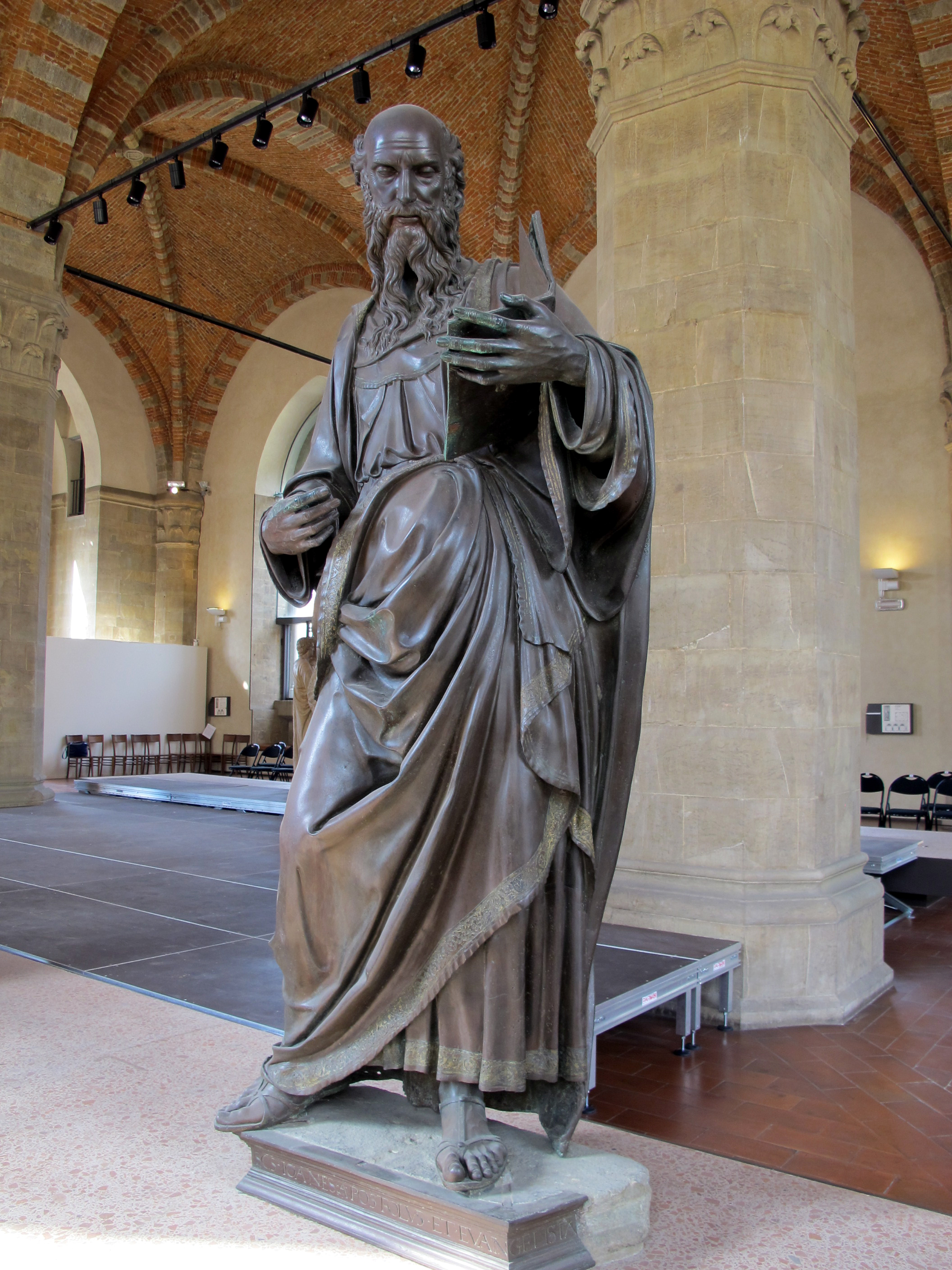 Museo di Orsanmichele - MIBAC This is a photo of a monument which is part of cultural heritage of Italy.